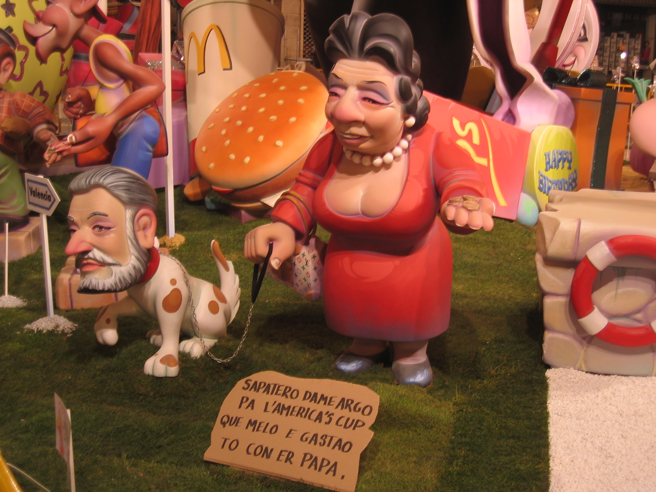 Ninot faller de Rita Barberà